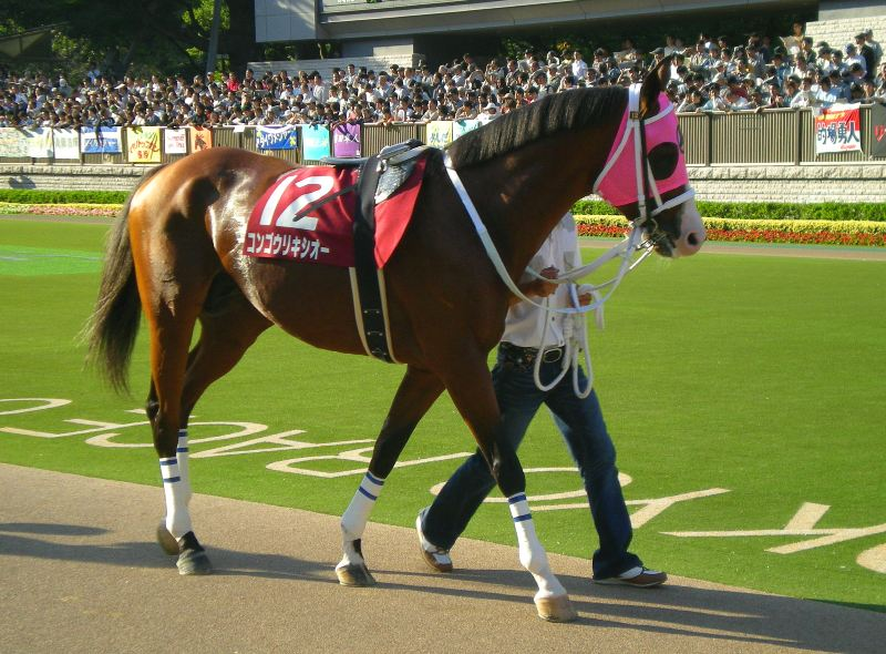 コンゴウリキシオー